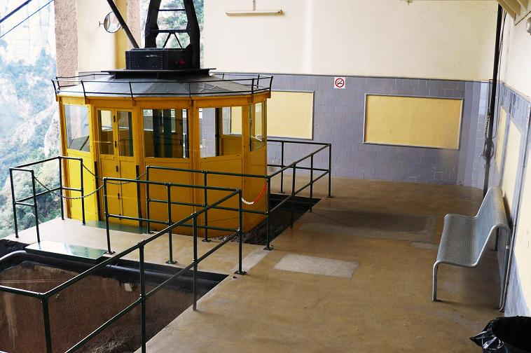 Kolej linowa Montserrat Aeri - górna stacja przy klasztorze.